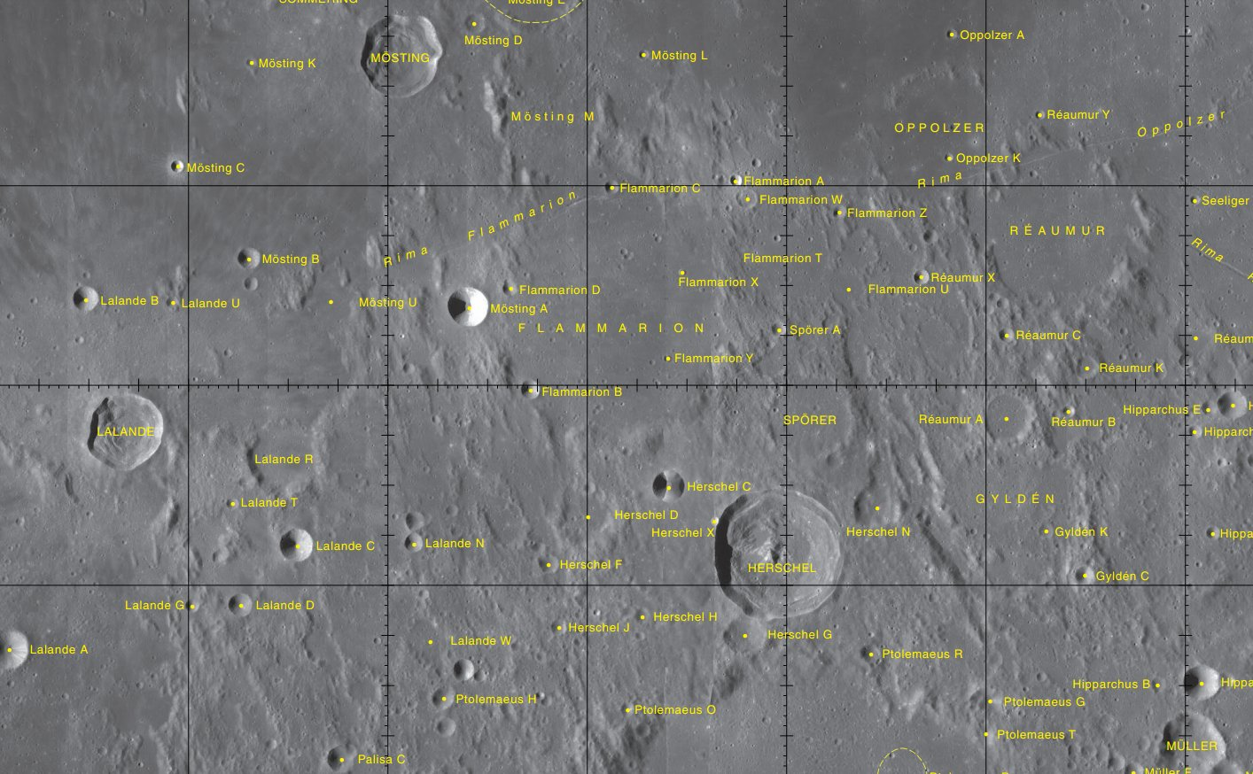 Cráter lunar Flammarion. Localización. (Imagen LROC)